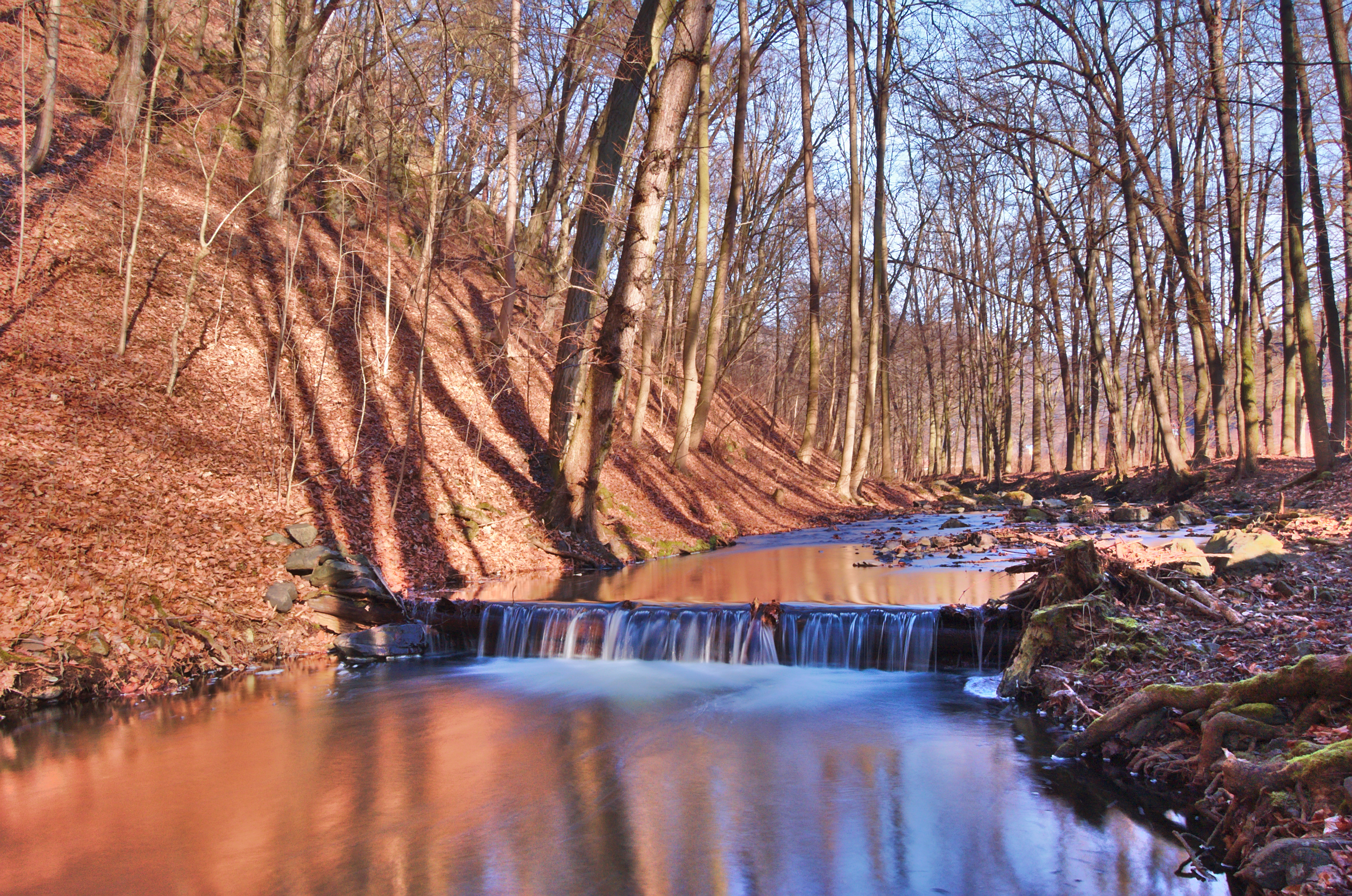 Bělá v Pilském údolí, Boskovice, okres Blansko